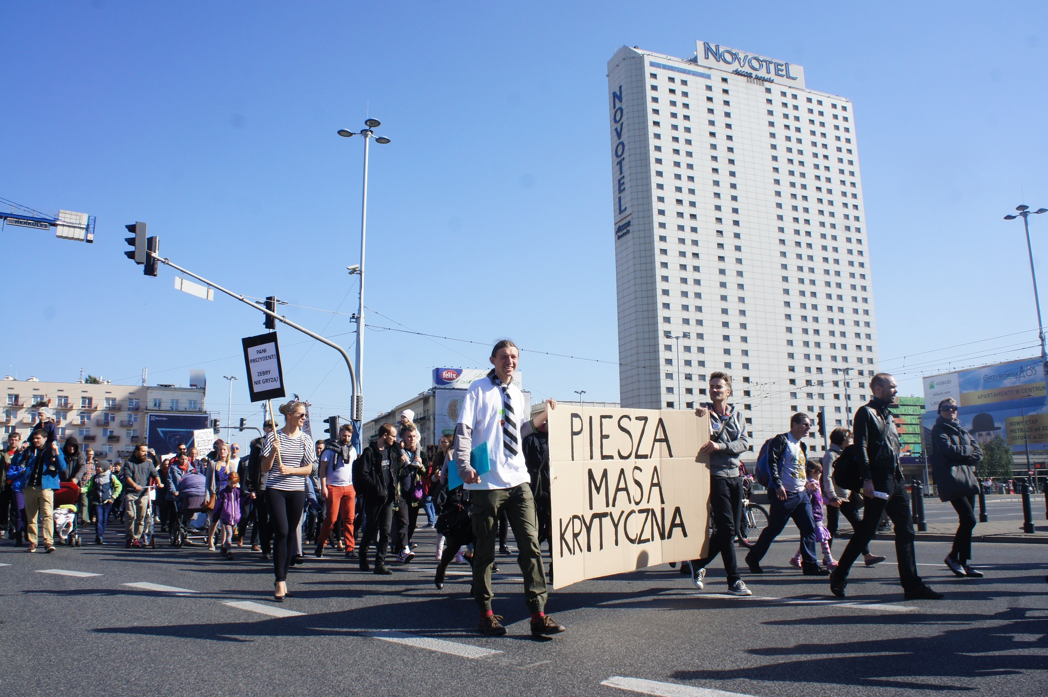 "Piesza Masa Krytyczna" na Rondzie Dmowskiego w Warszawie w dniu 30 września 2017.